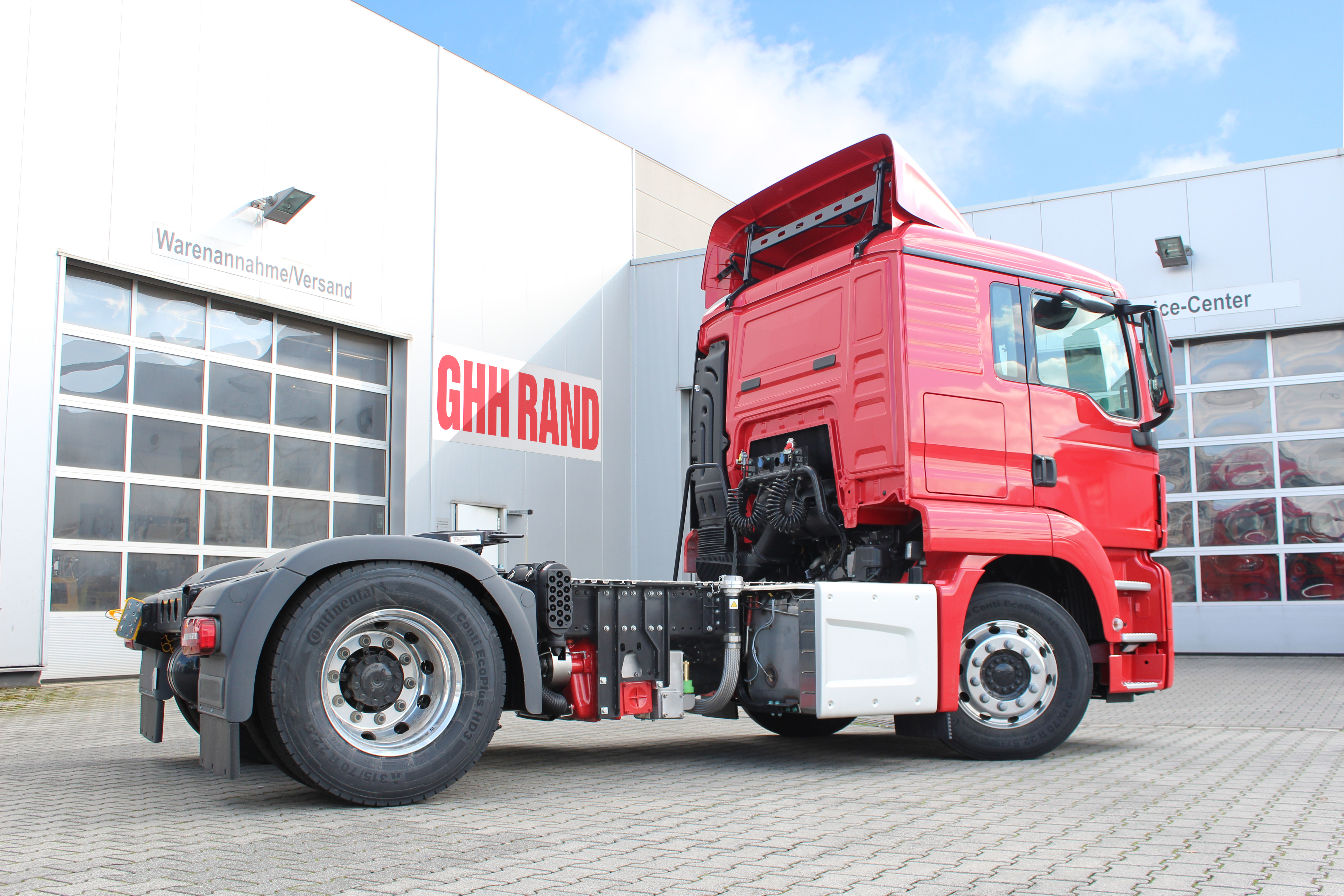 Silo-Lkw mit GHH RAND Schraubenkompressor zur Entladung von Schüttgut. GHH RAND; silo; SILU; screw compressors; dry bulk unloading; trucks; pneumatic conveying; Ingersoll Rand